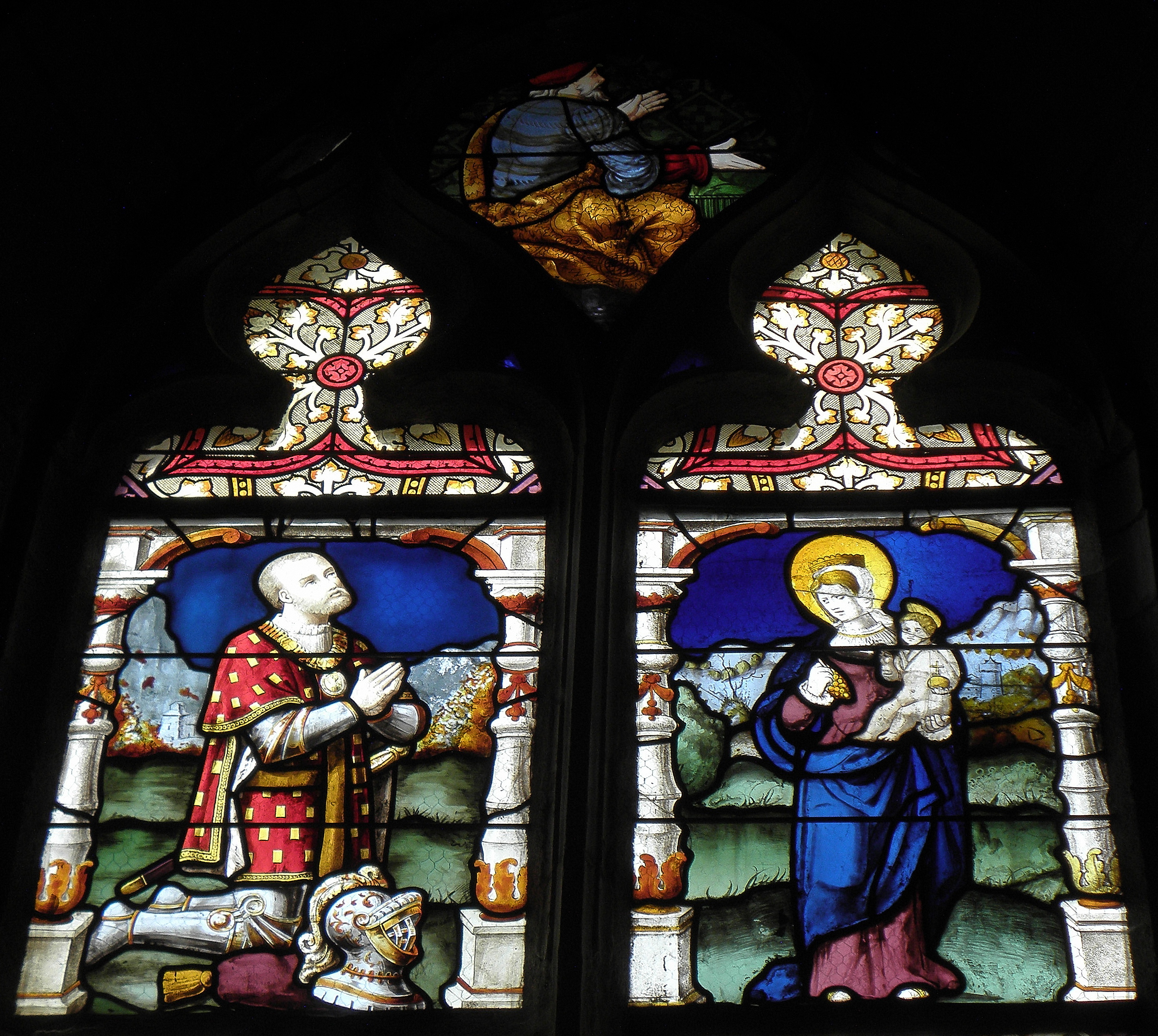 Baie 2 de l'église Saint-Pierre de Visseiche (35).